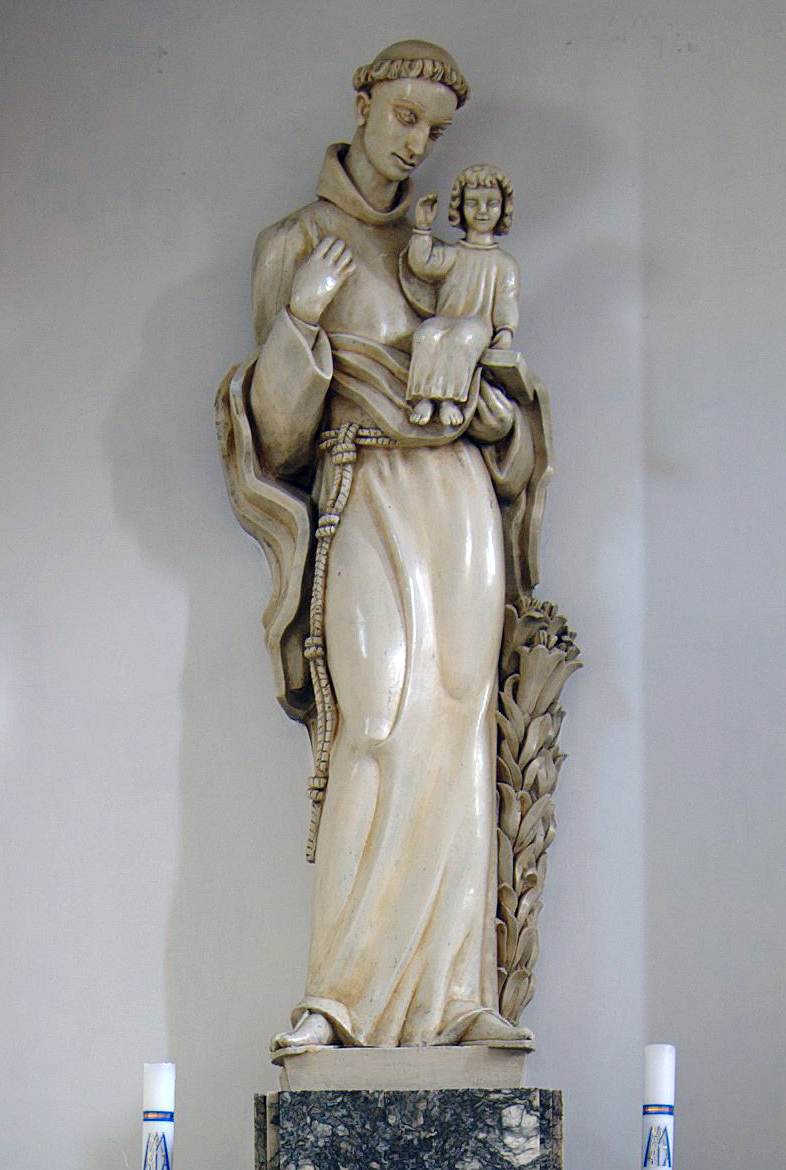 Święty Antoni z Padwy. Rzeźba Karola Muszkieta. Kościół garnizonowy w Katowicach.